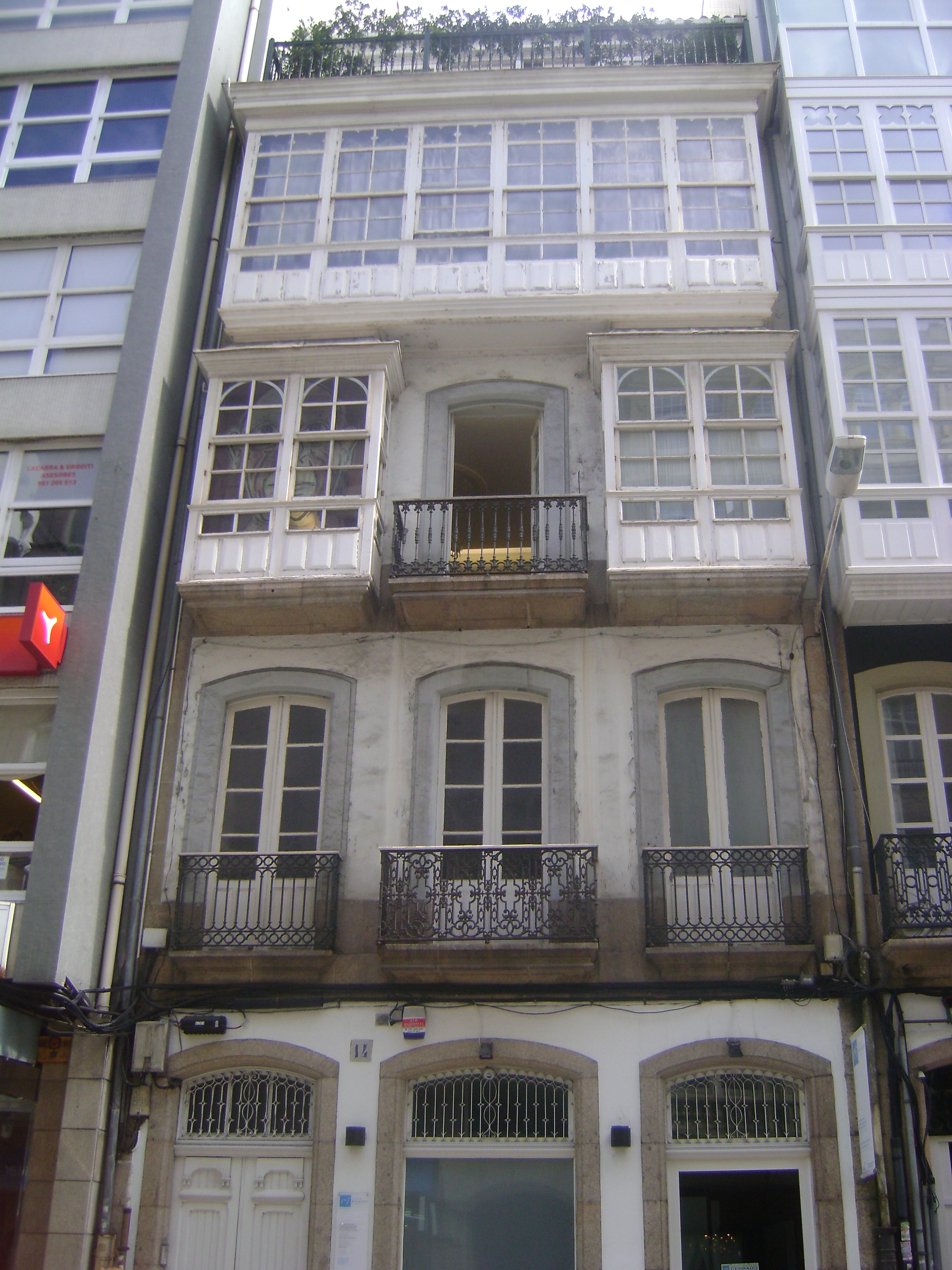 Casa de Picasso, La Coruña